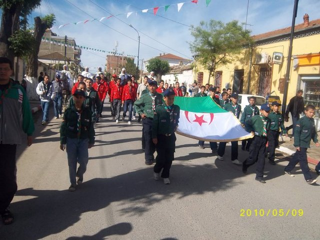 القائد